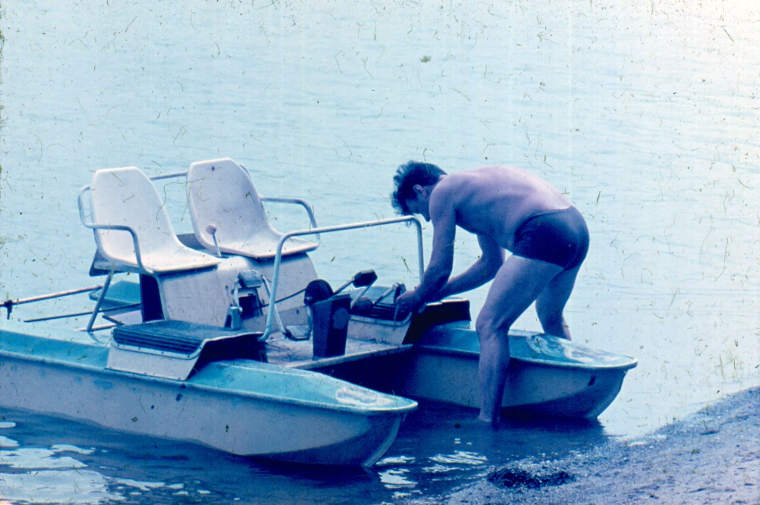 Водный велосипед. Владивосток, Садгород, 1982 год.